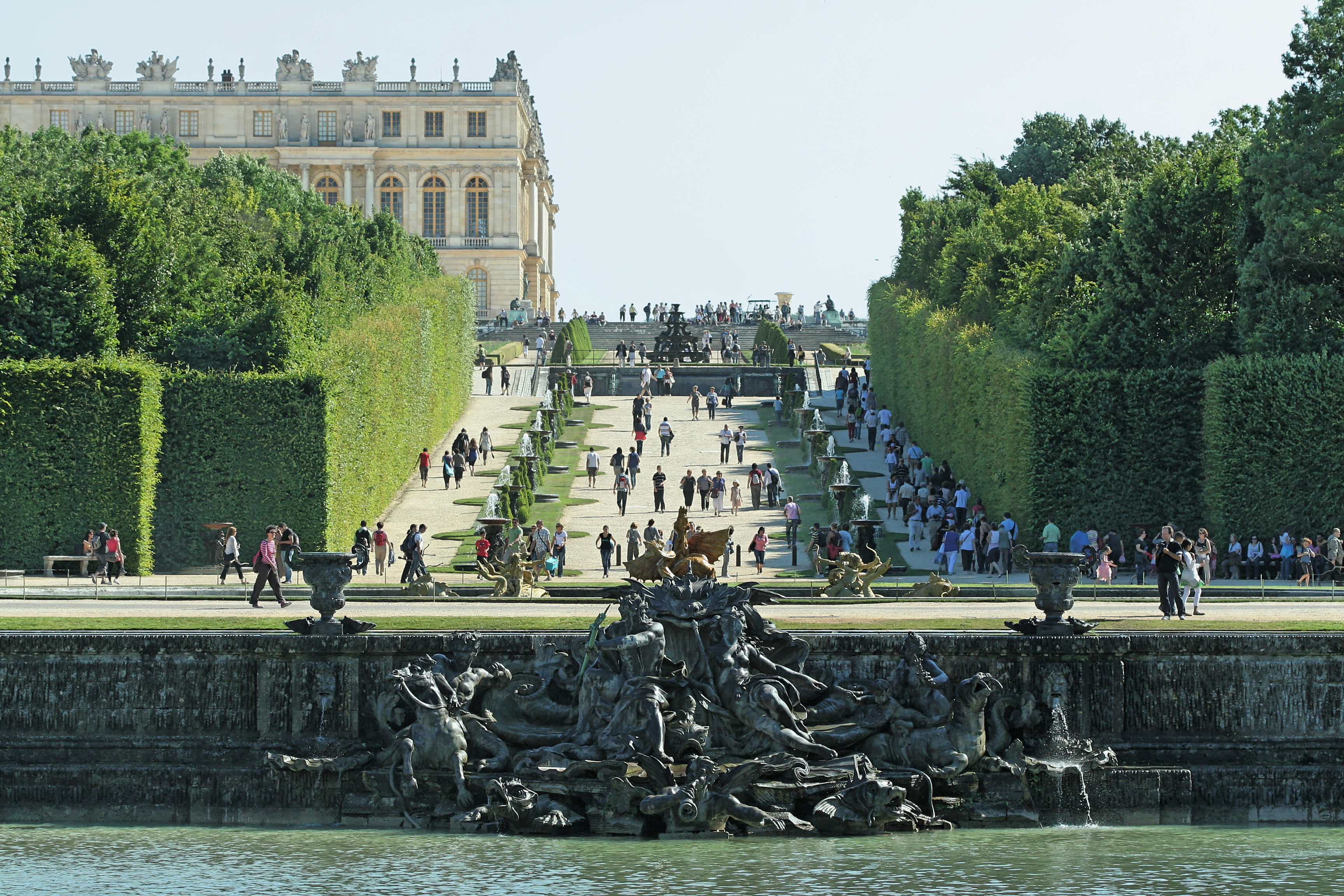 Parc de Versailles, Bassin de Neptune. Groupe central : Le Triomphe de Neptune et Amphitrite, Neptune brandissant son trident, Amphitrite recevant les richesses de la mer que lui présente une Naïade, sur le char marin accompagnés de Tritons et de monstres marins. Plomb, Lambert Sigisbert Adam, 1736-1740. Hauteur : 4,50 m ; Largeur : 7,40 m. Numéro d'inventaire : inv1850n°9495